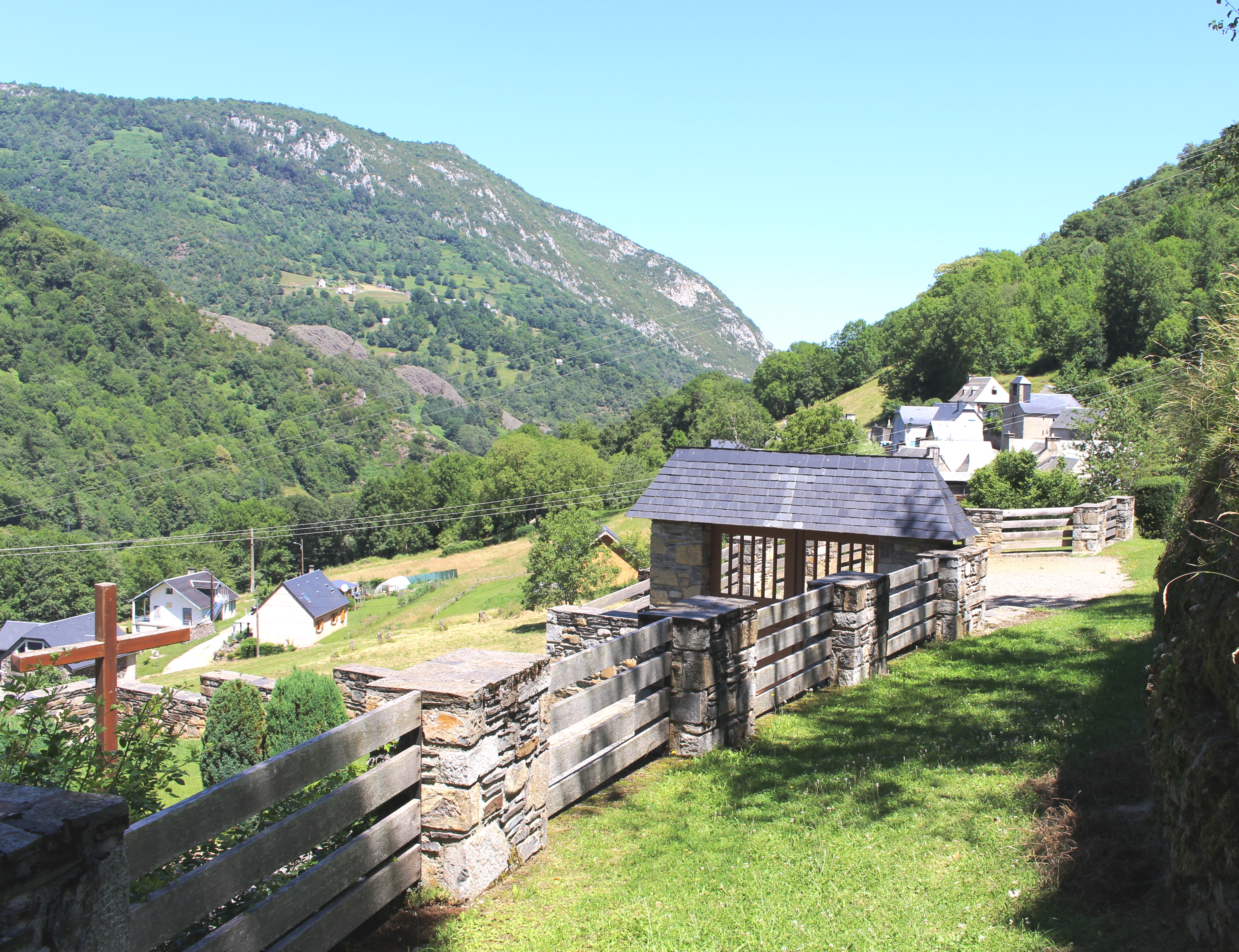 Fréchet-Aure (Hautes-Pyrénées)